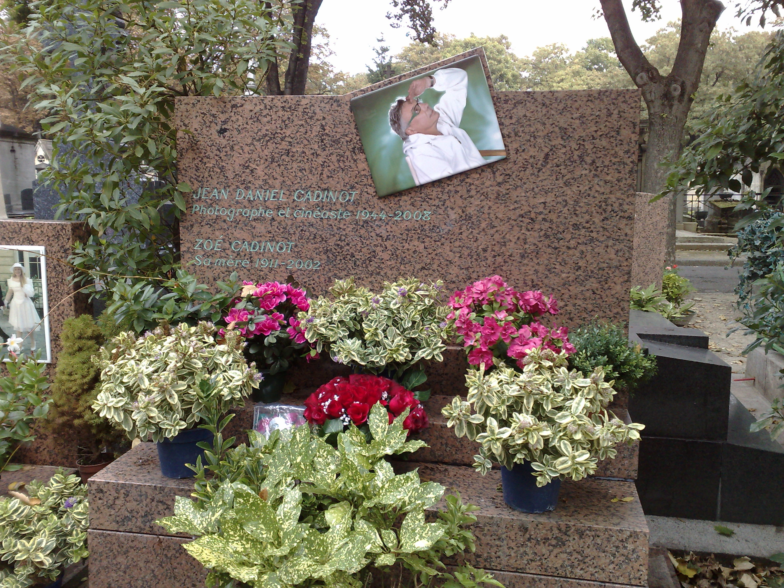 Grab von Jean Daniel Cadinot und seiner Mutter Zoé Cadinot (1911-2002)